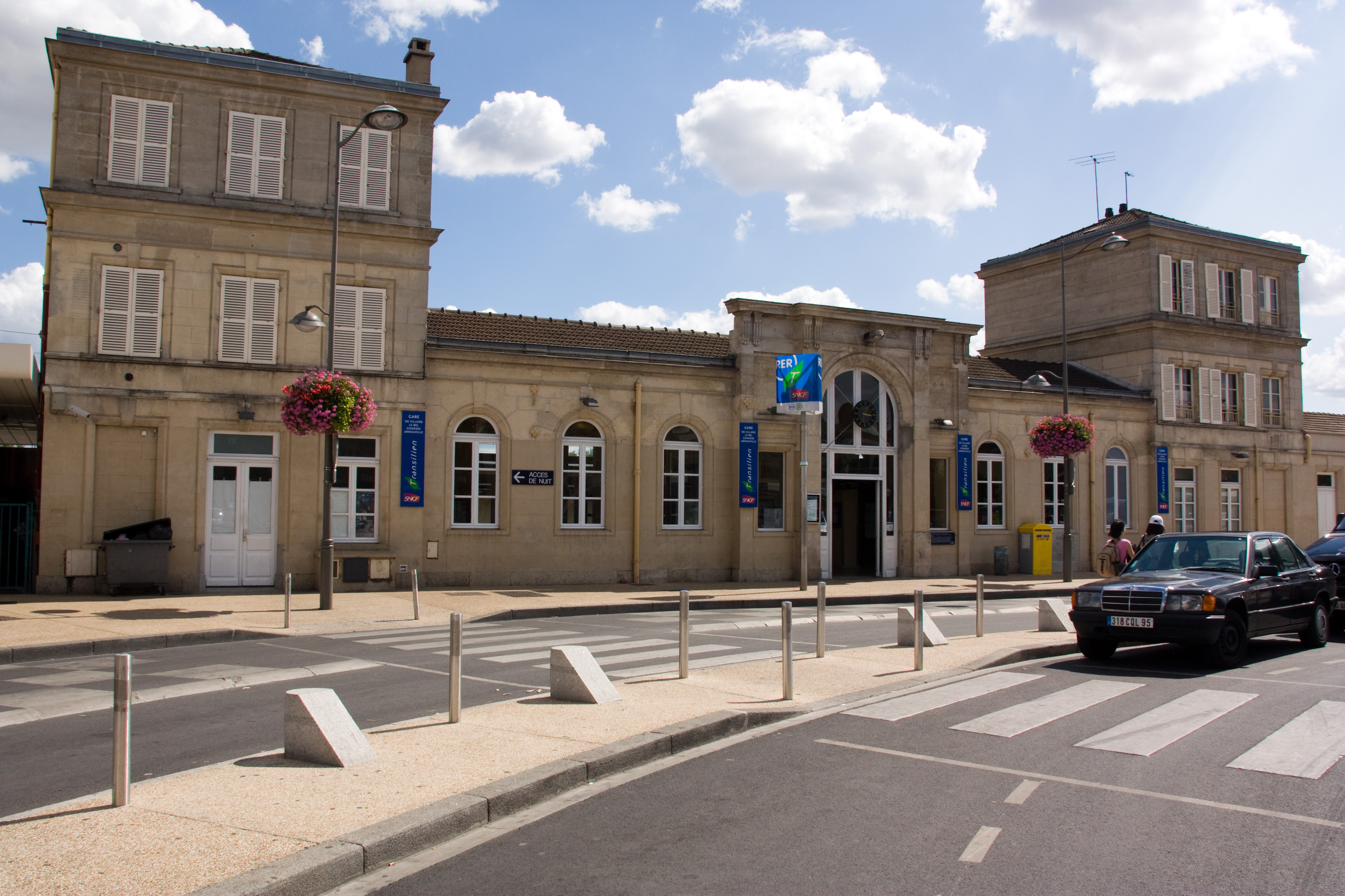 La Gare de Villiers-le-Bel - Gonesse - Arnouville, département du Val-d'Oise, France